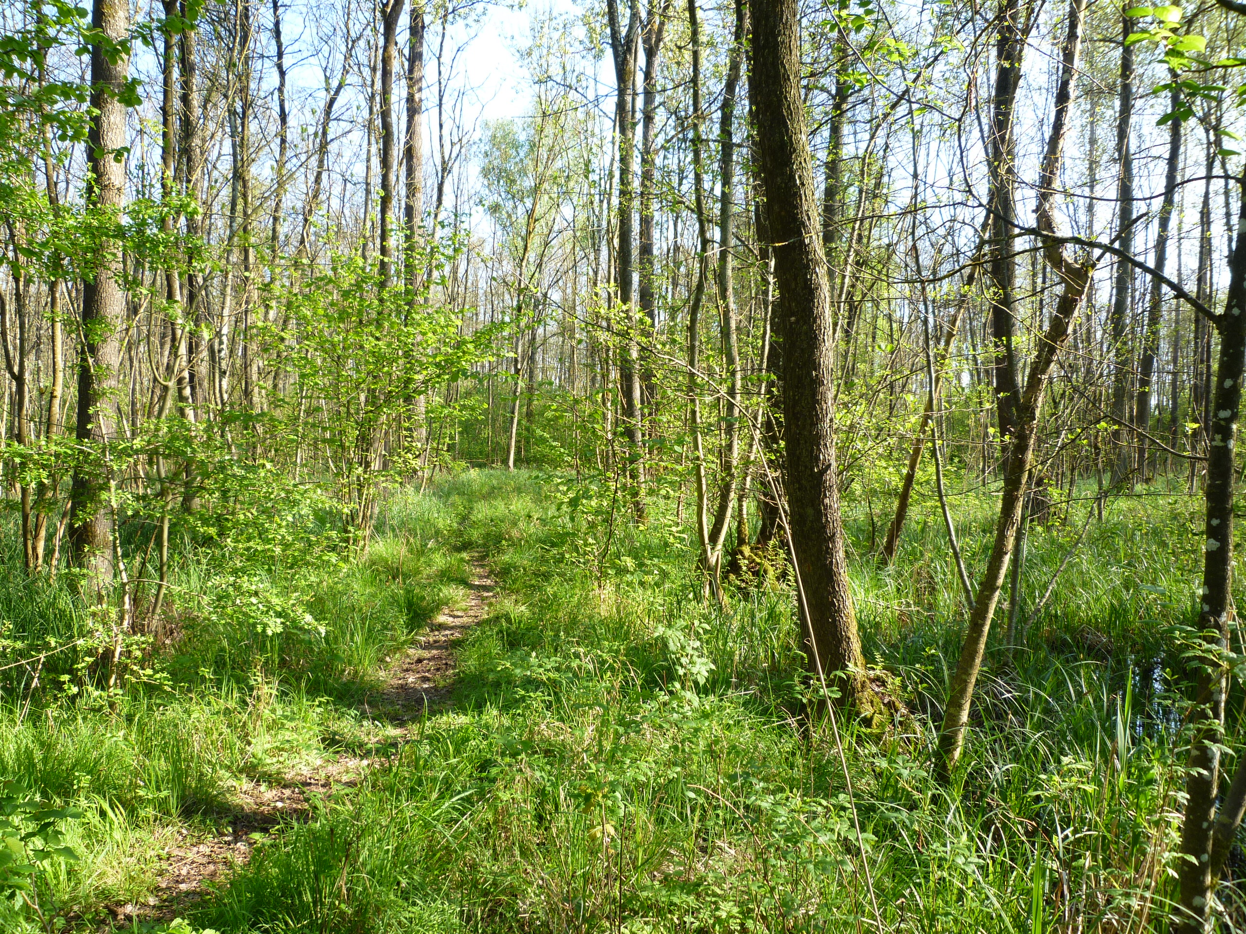 Die Wälder im Donautal, die sich über die Landkreise Regensburg und Straubing-Bogen erstrecken bieten unterschiedlichen Baumbestand und starken Unterwuchs. Auch bedingt durch die zahlreichen Feuchtgebiete bieten hervorragende Lebensbedingungen für eine Vielzahl von Lebewesen. Das Gebiet ist auch EU-Vogelschutzgebiet.